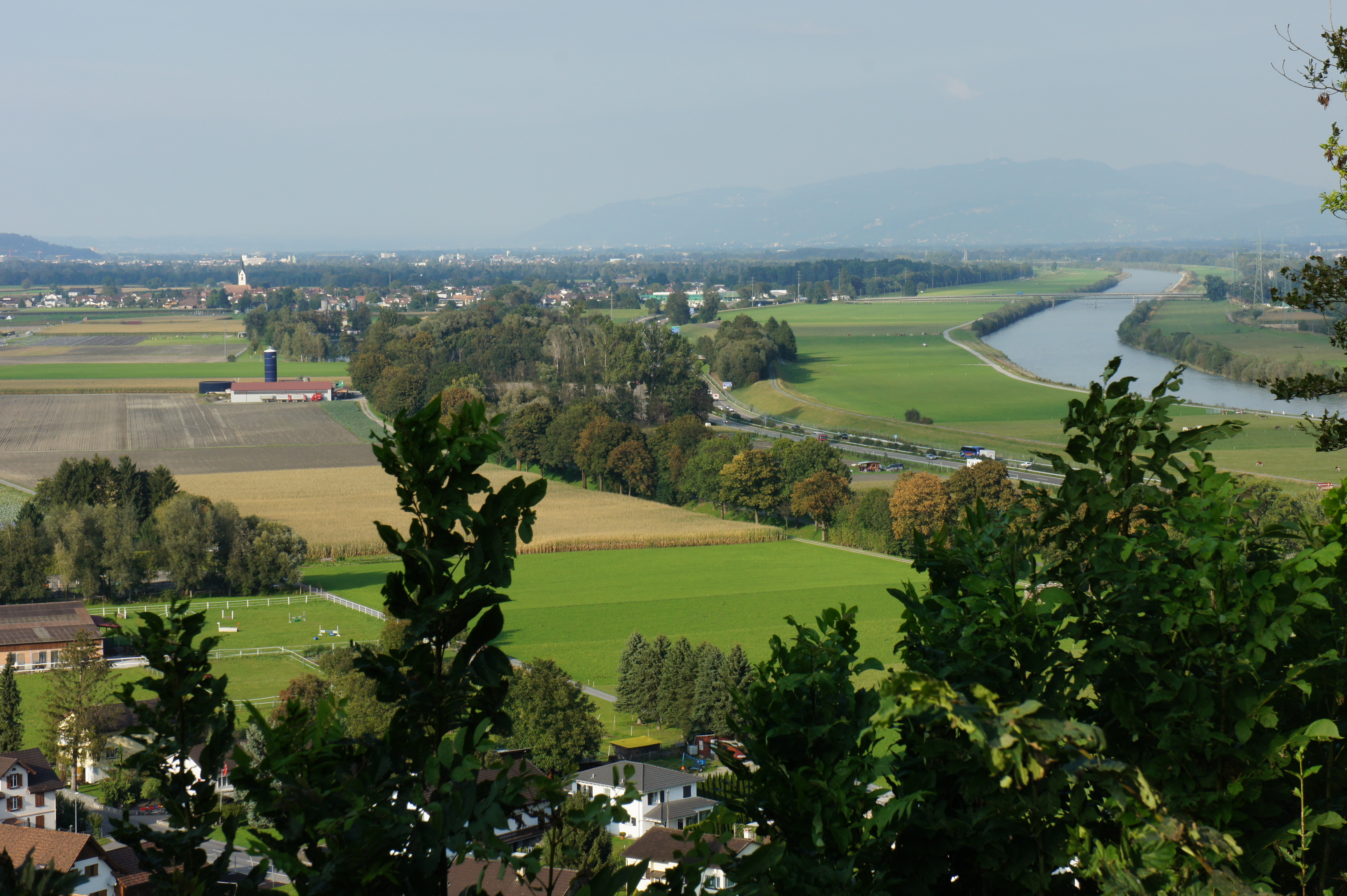 Blick vom Rastplatz auf dem Montlingerberg in Richtung Norden. Links im Hintergrund liegt Kriessern. In der Mitte erkennt man die Autobahn A13. Rechts vom Rhein Vorarlberg / Österreich.